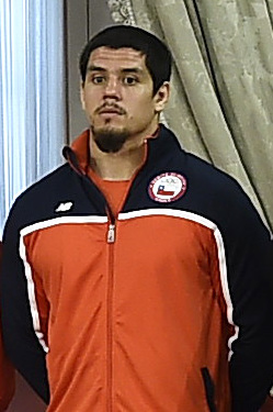 Gobierno de Chile